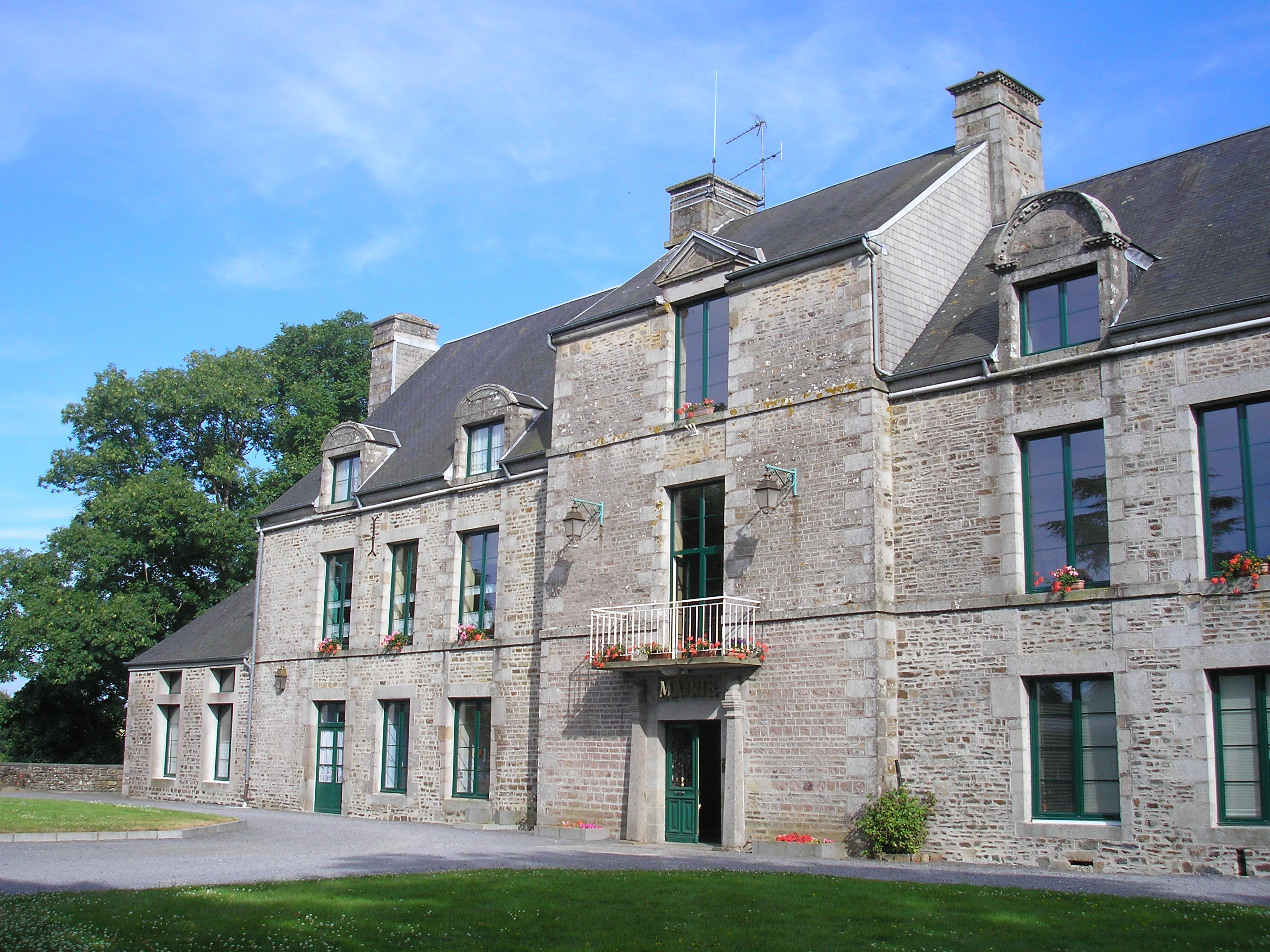 Montbray (Normandie, France). Le château, aujourd'hui mairie.